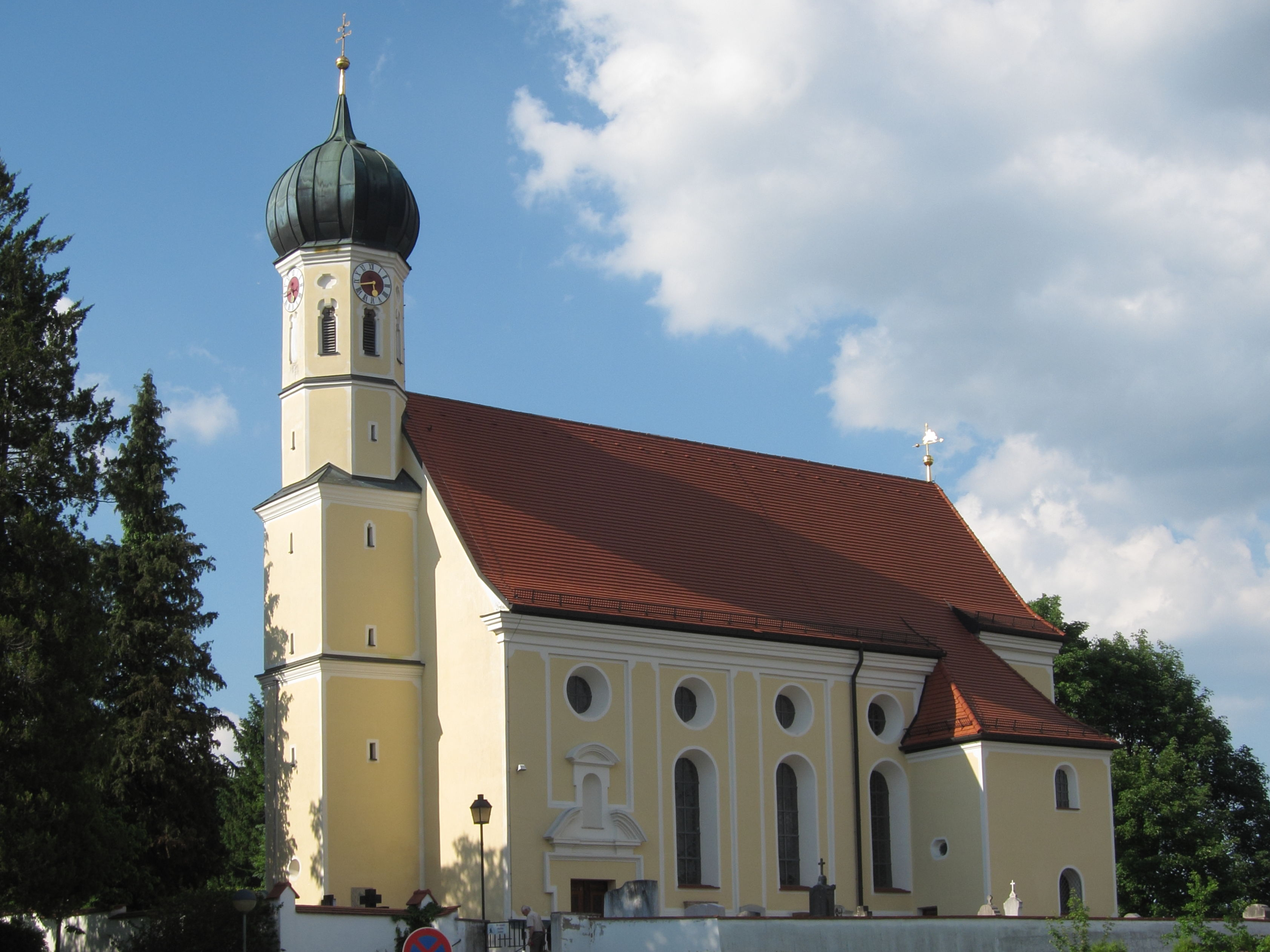 Pöring, Gde. Zorneding; kath. Filialkirche St. Georg; barock, 1696; mit Ausstattung.